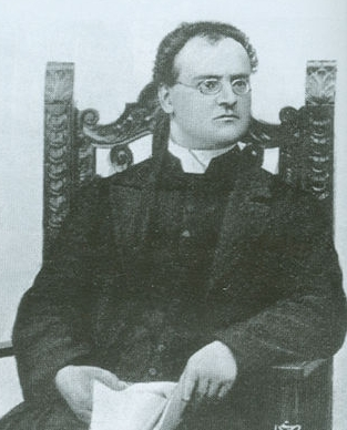 Romolo Murri (1870-1944)